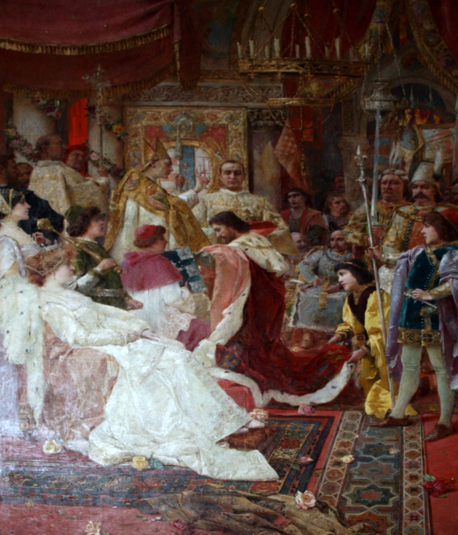 Krunidba Ladislava Napuljskog 1403. godine starom hrvatskom krunom, rad Celestina Medovića u Hrvatskom institutu za povijest u Zagrebu (Coronation of Ladislas of Naples in 1403 with the Croatian crown, a painting by Celestina Medovića at the Croatian Institute for History in Zagreb)